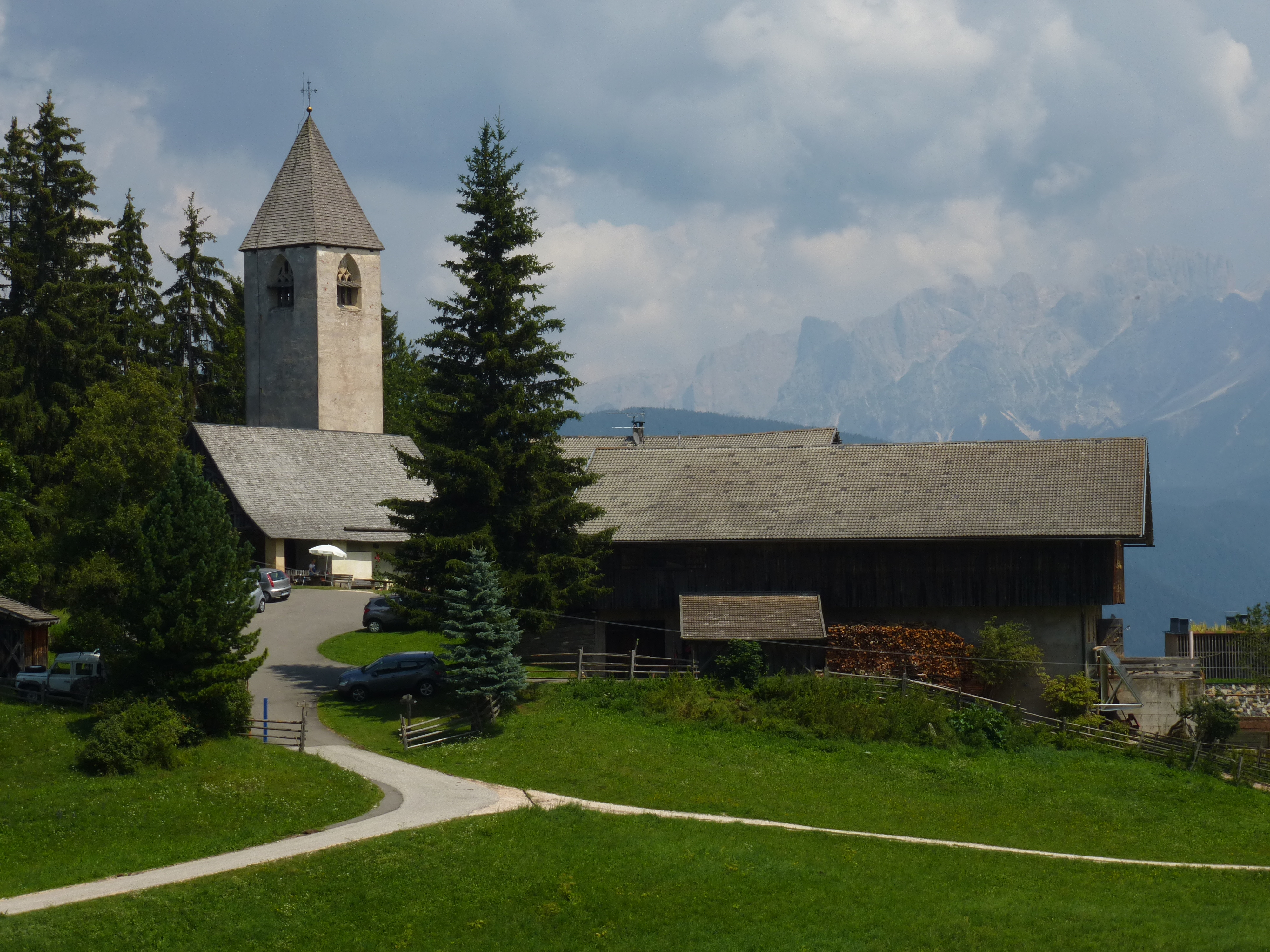 Kirche St. Helena in Deutschnofen / Südtirol mit dem benachnarten Kreuzhof